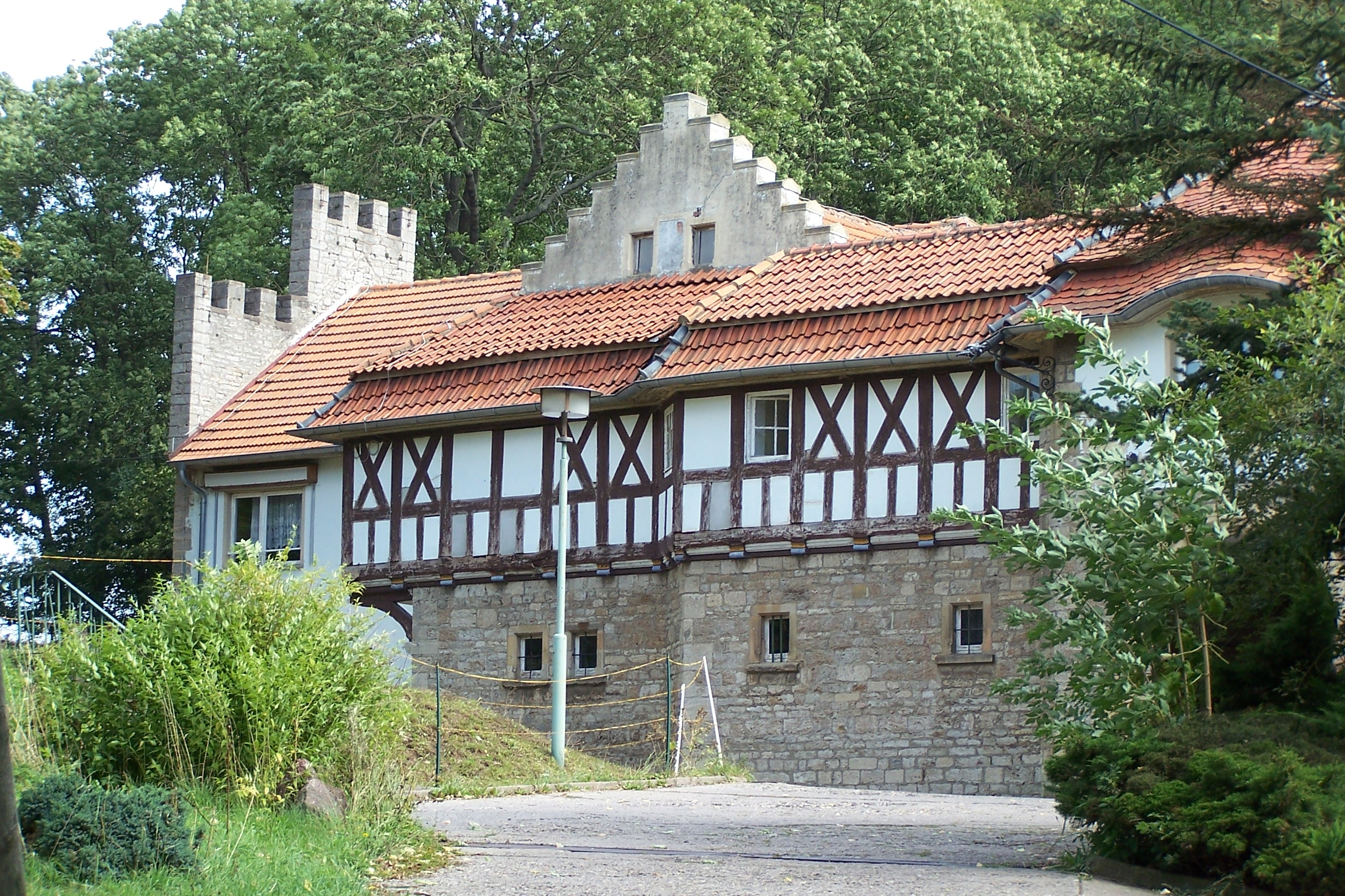 Ansichten und Details zum Schloss in Wenigenlupnitz.